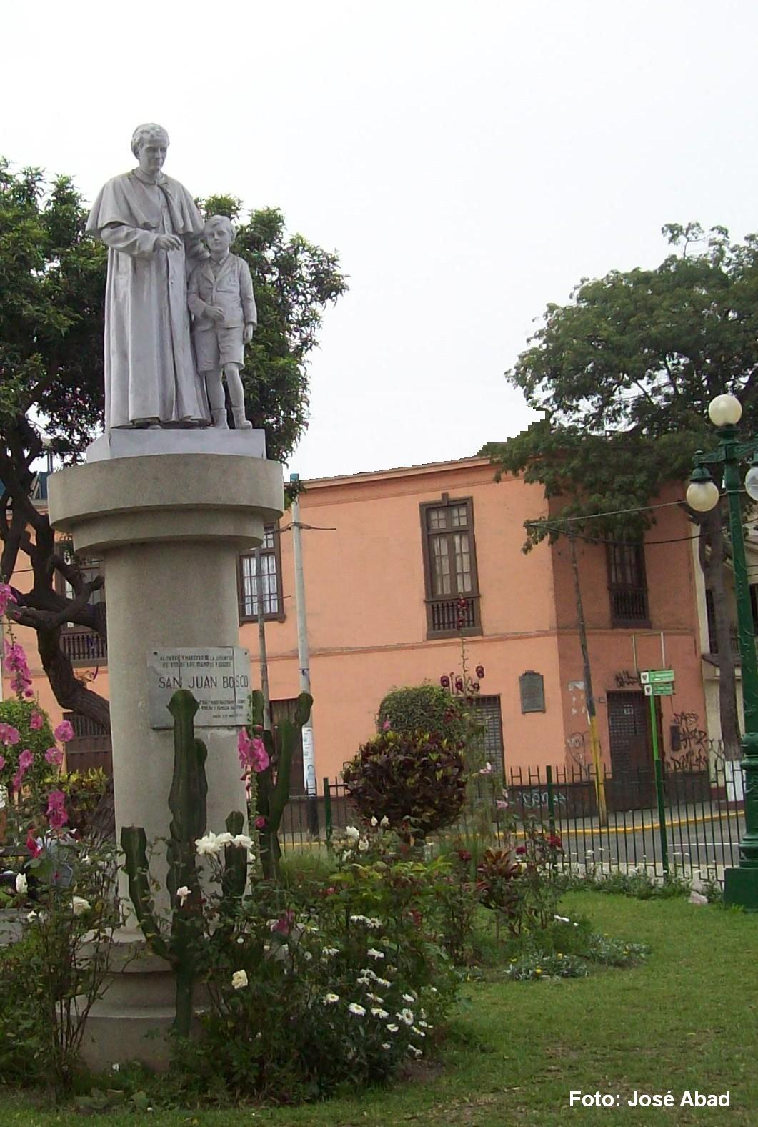 Monumento a Don Bosco en la Plaza Pedro Silva. El óvalo comprende las intercepciones del Jirón Varela y Jirón Independencia.